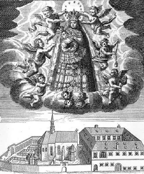 Historischer Stich des Augustinerklosters Ingolstadt mit dem Bild der Schuttermutter